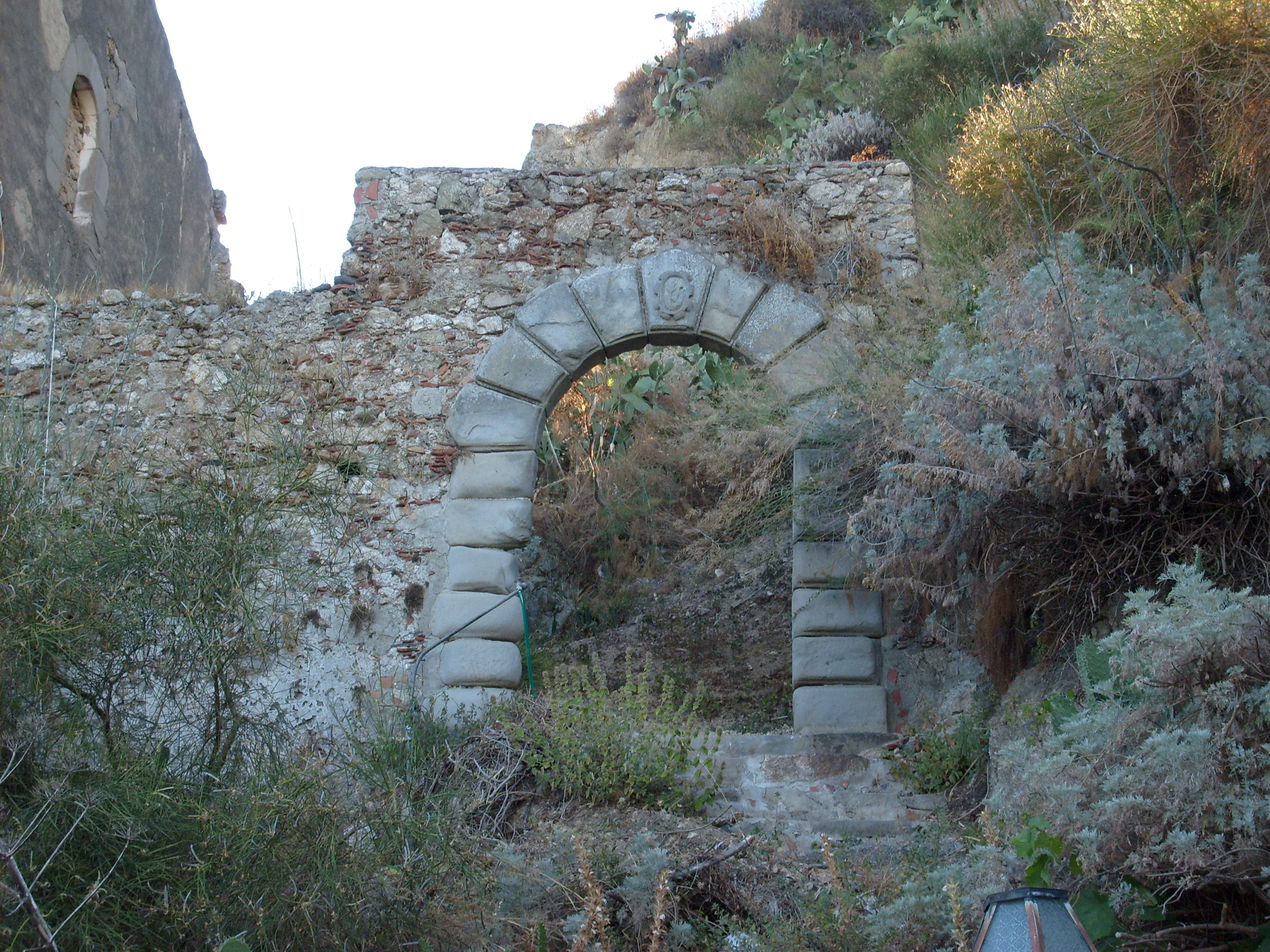 Antico portale a Savoca